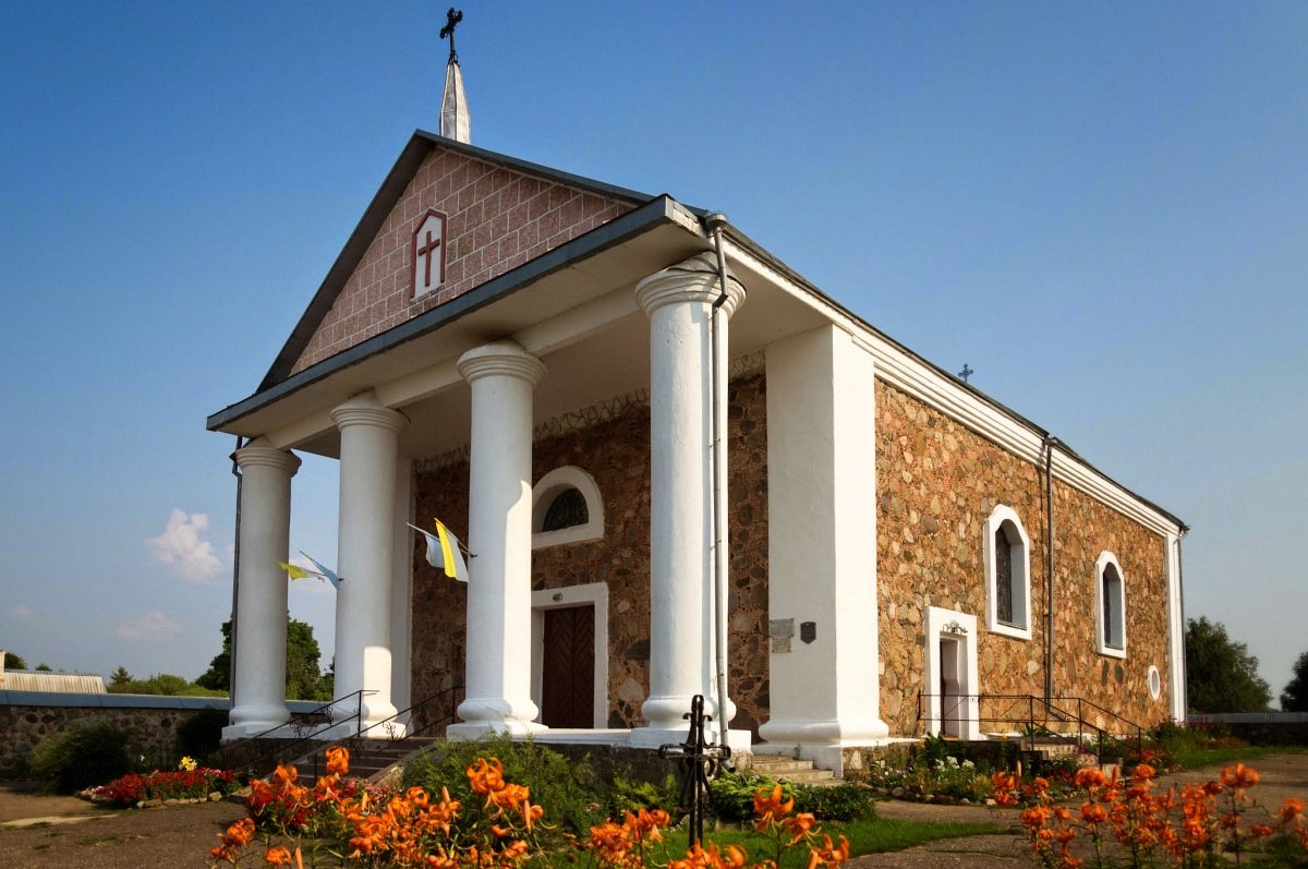 Дзеркаўшчына. Касцёл